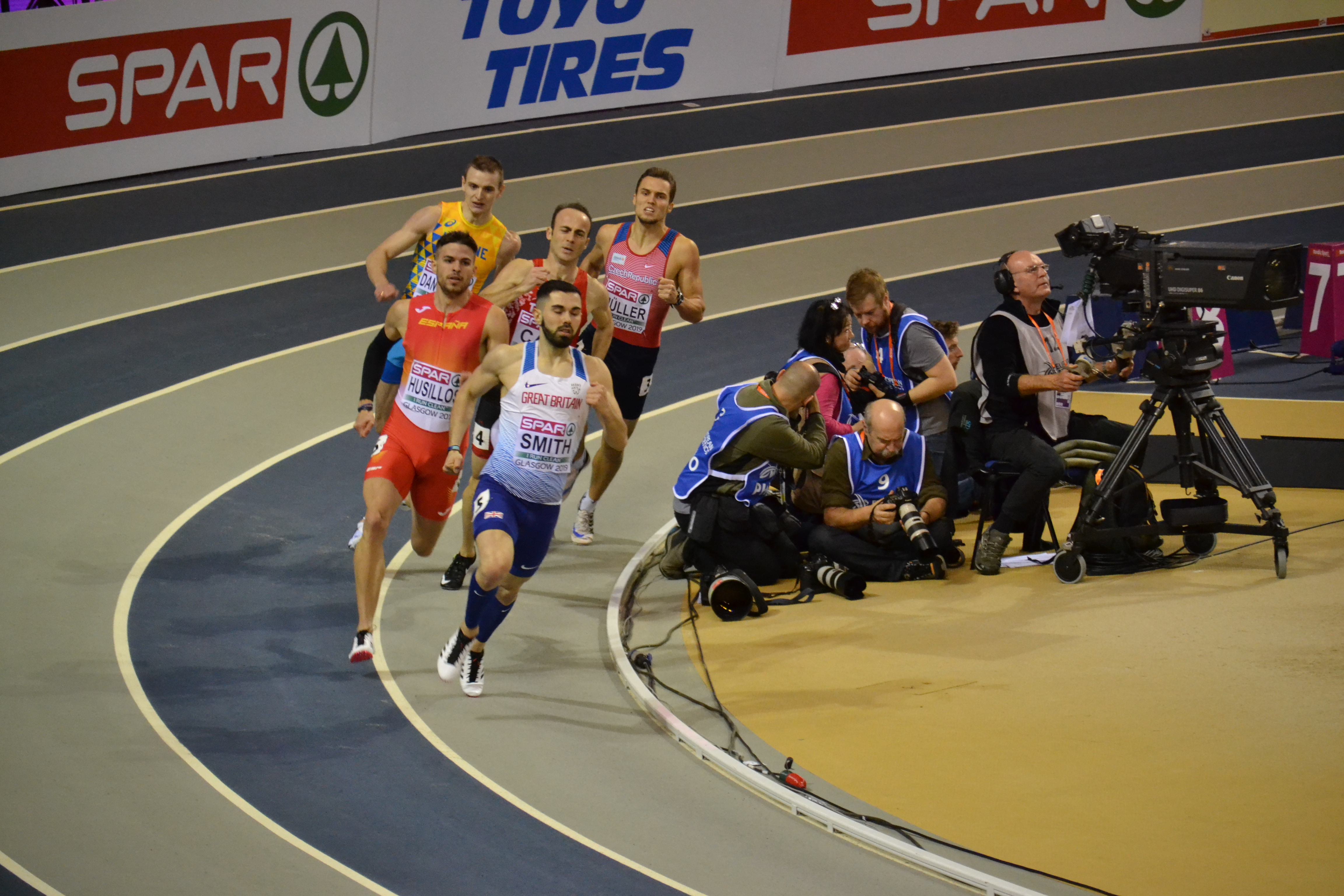 Mens 400m